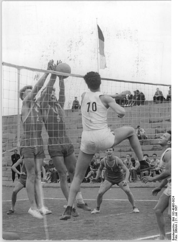 Leipzig, Turn- und Sporttreffen, Volleyball Zentralbild Leipzig (Dittrich) Ho. 21.7.1957 Turn- und Sporttreffen der Jugend in Leipzig. Im Rahmen des Turn- und Sporttreffens wurden am Sonntag, dem 21.7.1957, die Endspiele im Sonderklassenturnier der männlichen und weiblichen Jugend und im Hauptturnier der 15 Bezirksmeister ausgetragen. UBz: Im Sportforum siegte im Sonderklassenturnier der männlichen Jugend A die Mannschaft von Einheit Saalfeld über Rotation Berlin mit 3:2. (Rotation Berlin mit weissem Dress).